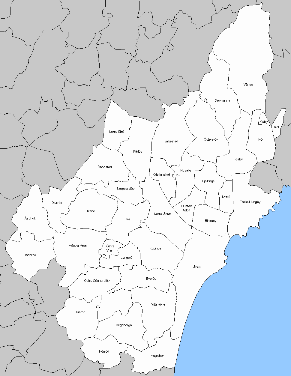 Socken in Kristianstad